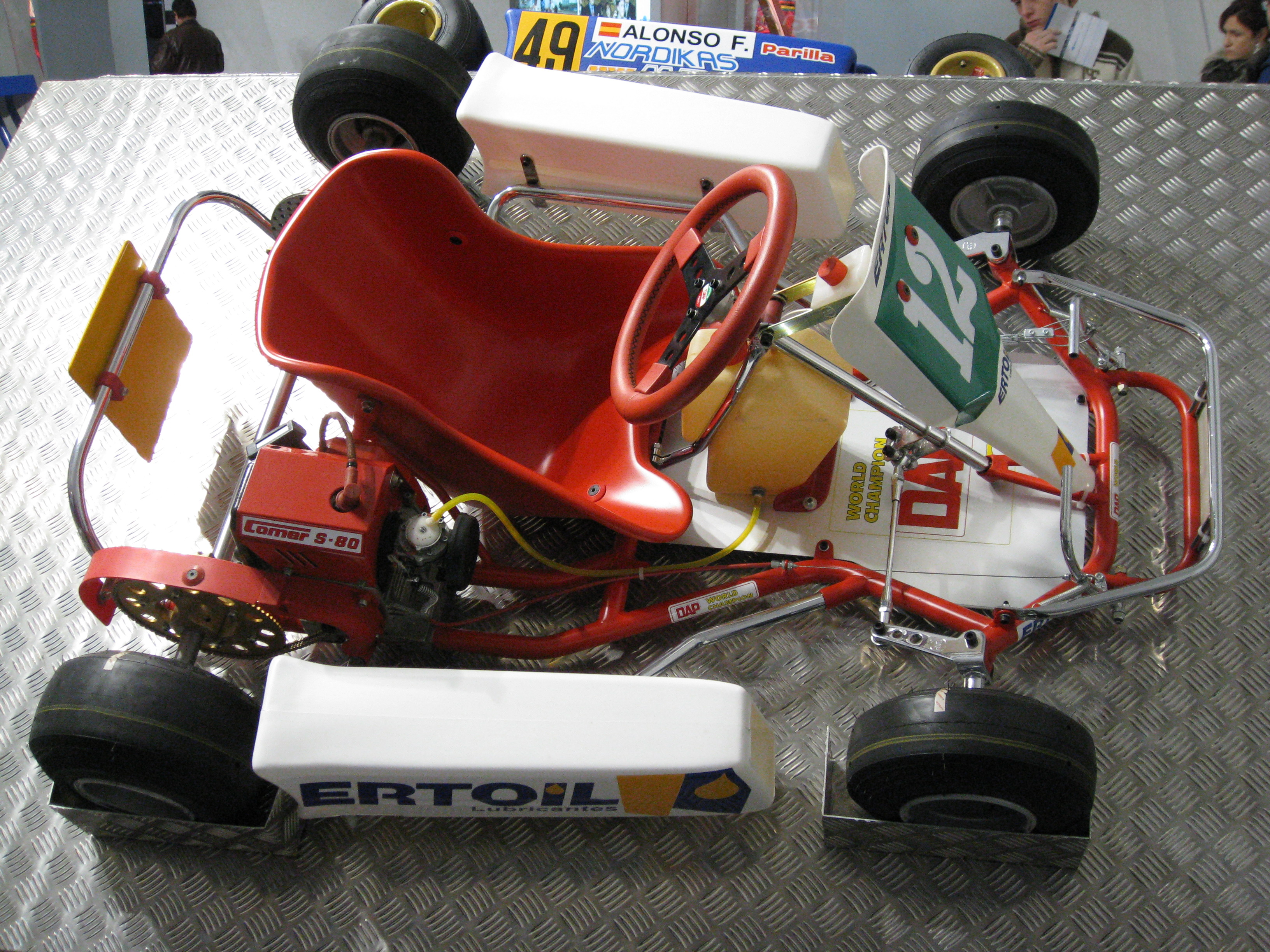 Kart de Fernadno Alonso de la categoría cadete